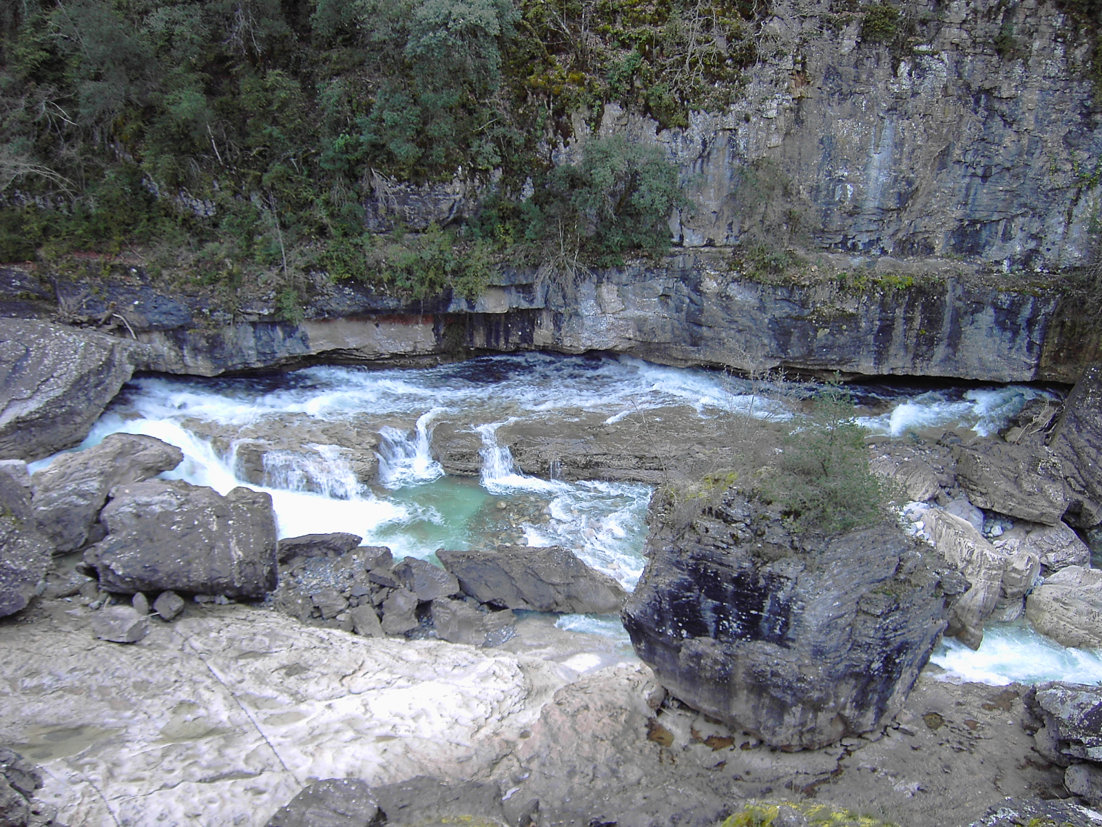 Los rápidos del Río Vellos en su paso por el Congosto d'as Cambras camino de Puiarruego. Parque Nacional de Ordesa y Monte Perdido, Aragón.